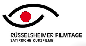 Logo der Rüsselsheimer Filmtage